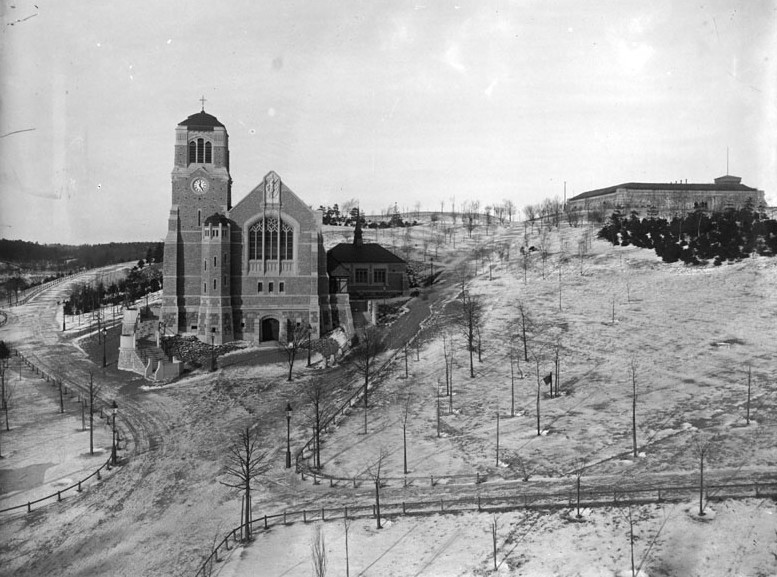 Vanadislunden i Stockholm med Stefanskyrkan och vattenreservoaren på höjden längs i bakgrunden